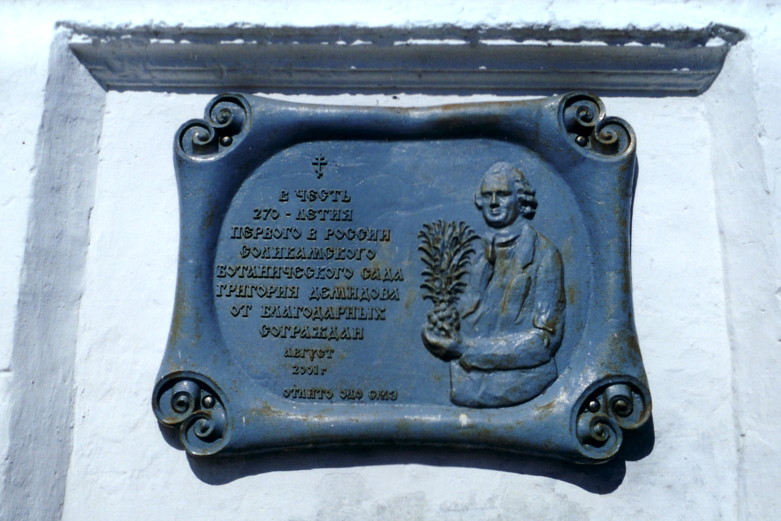 Памятная доска в честь 270-летия первого в России Ботанического сада Григория Демидова, установленная на стене храма Иоанна Предтечи (Красное село). Скульптор Анатолий Ворона, архитектор Петрос Карапетян (обмеры и определение размеров доски: 1,5 на 1,2 метра). Исполнение: Соликамский магниевый завод (начальник литейного отделения Михаил Геннадьевич Садыков и модельщик Пётр Георгиевич Шибанов)